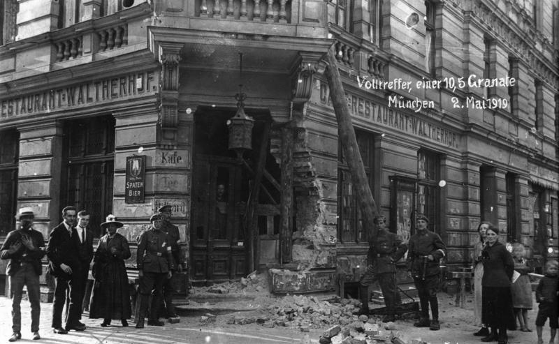 Volltreffer einer 10,5 Granate München, 2. Mai 1919